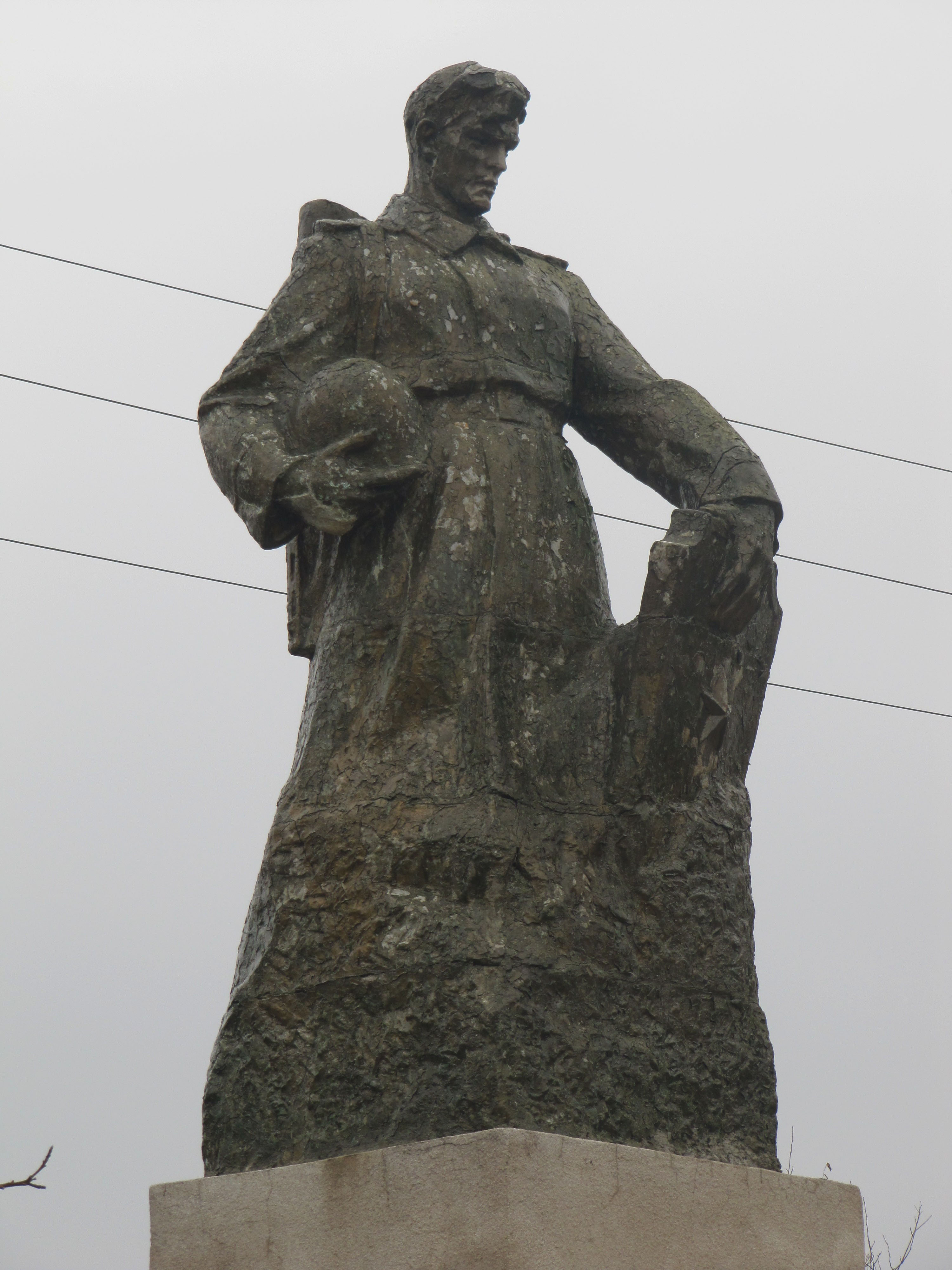 Новоодеський район, село Новопетрівське Миколаївська весна у Вікіпедії